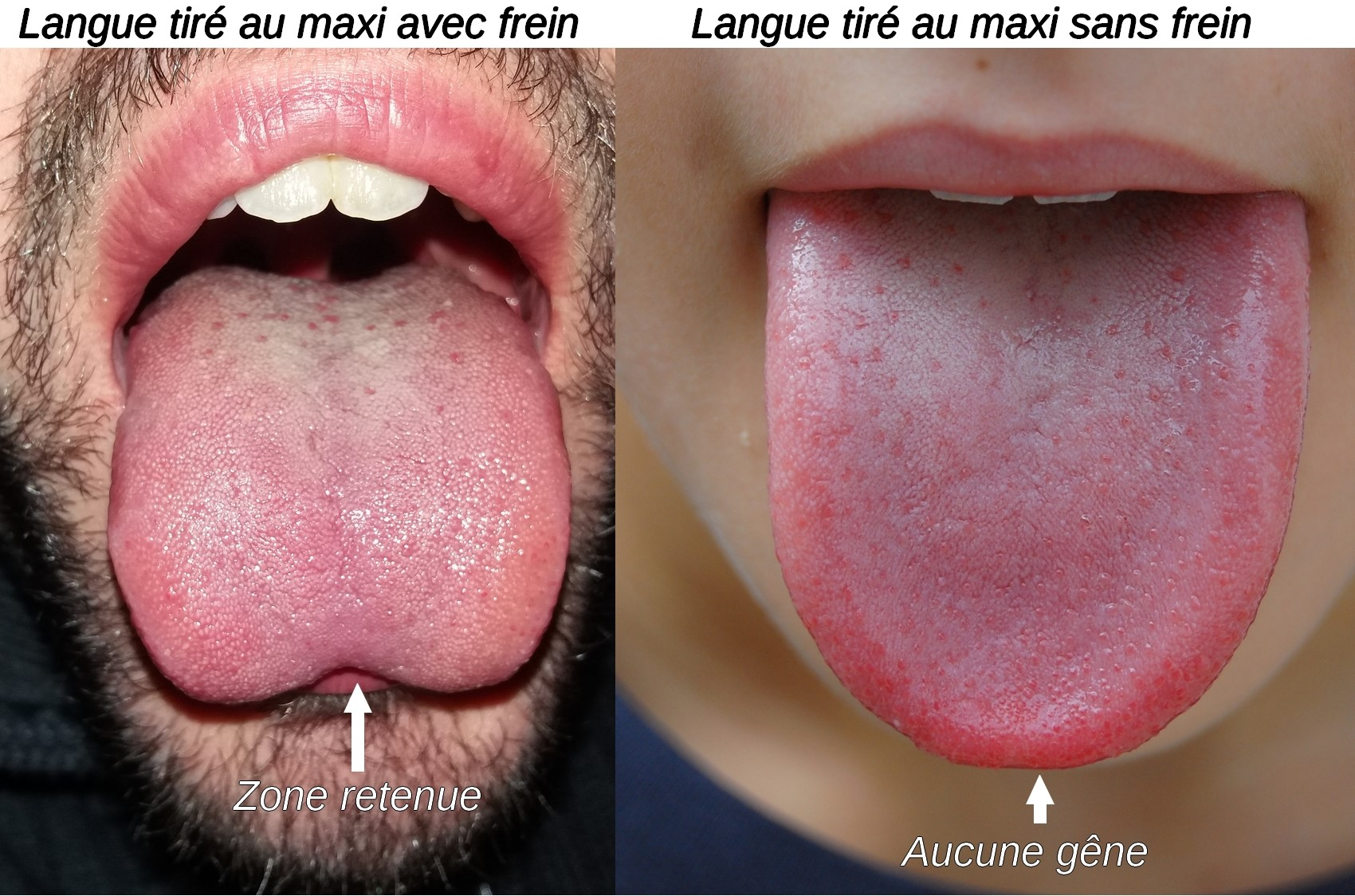 Sur cette image, nous y voyons une langue souffrante d'un frein lingual et une autre sans gêne car sans frein, la différence est notable.